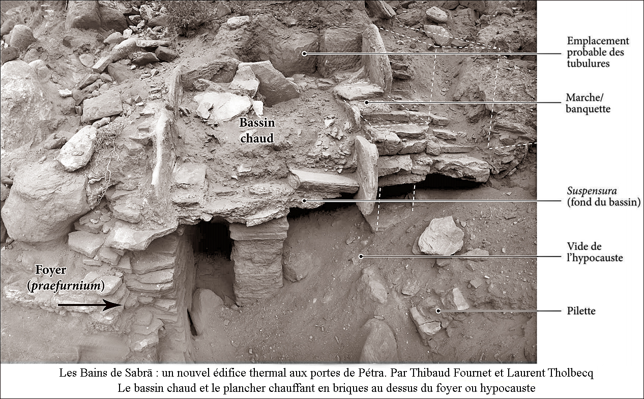 Le bassin chaud et son hypocauste des thermes de Sabra, aux cours des fouilles de 2014.